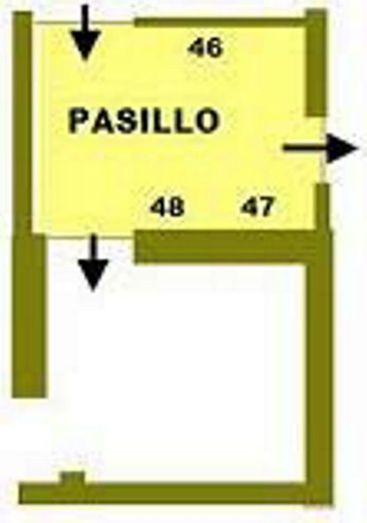 Distribución de las obras en el pasillo del Museo Ulpiano Checa.